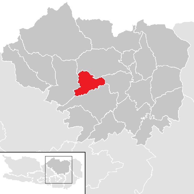 Bezirk Sankt Veit an der Glan